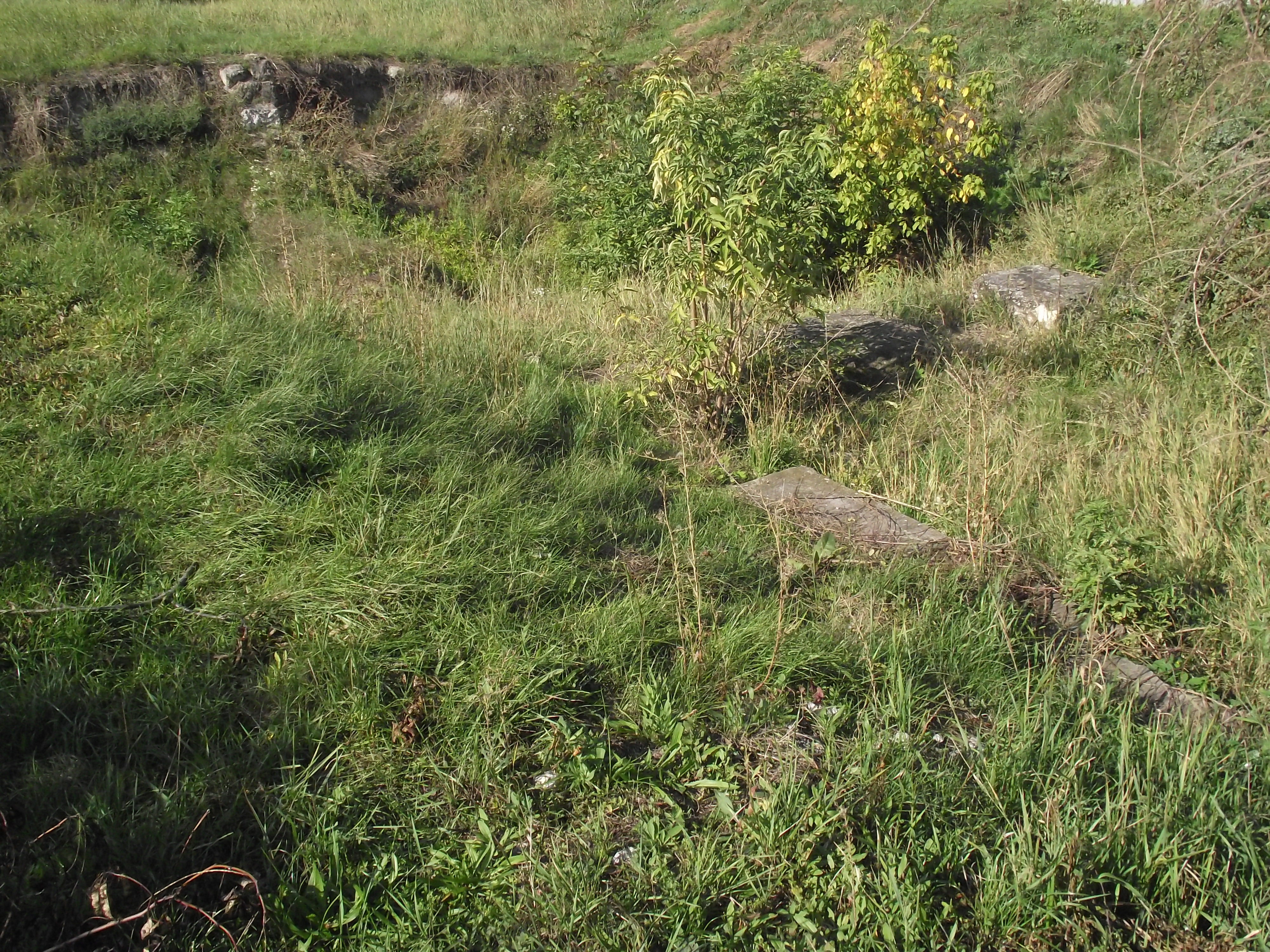 római tábor romjai